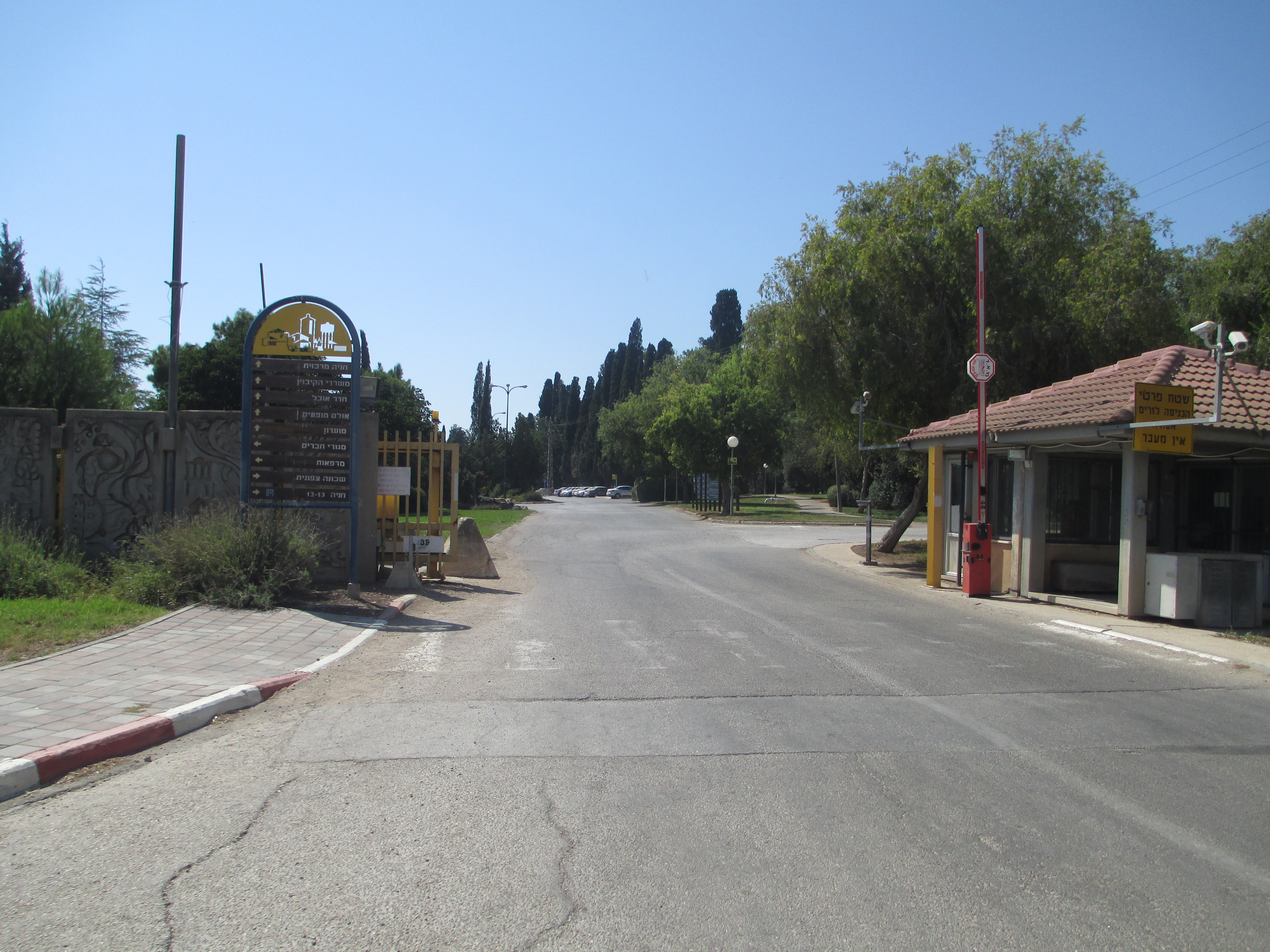 הכניסה לקיבוץ מזרע